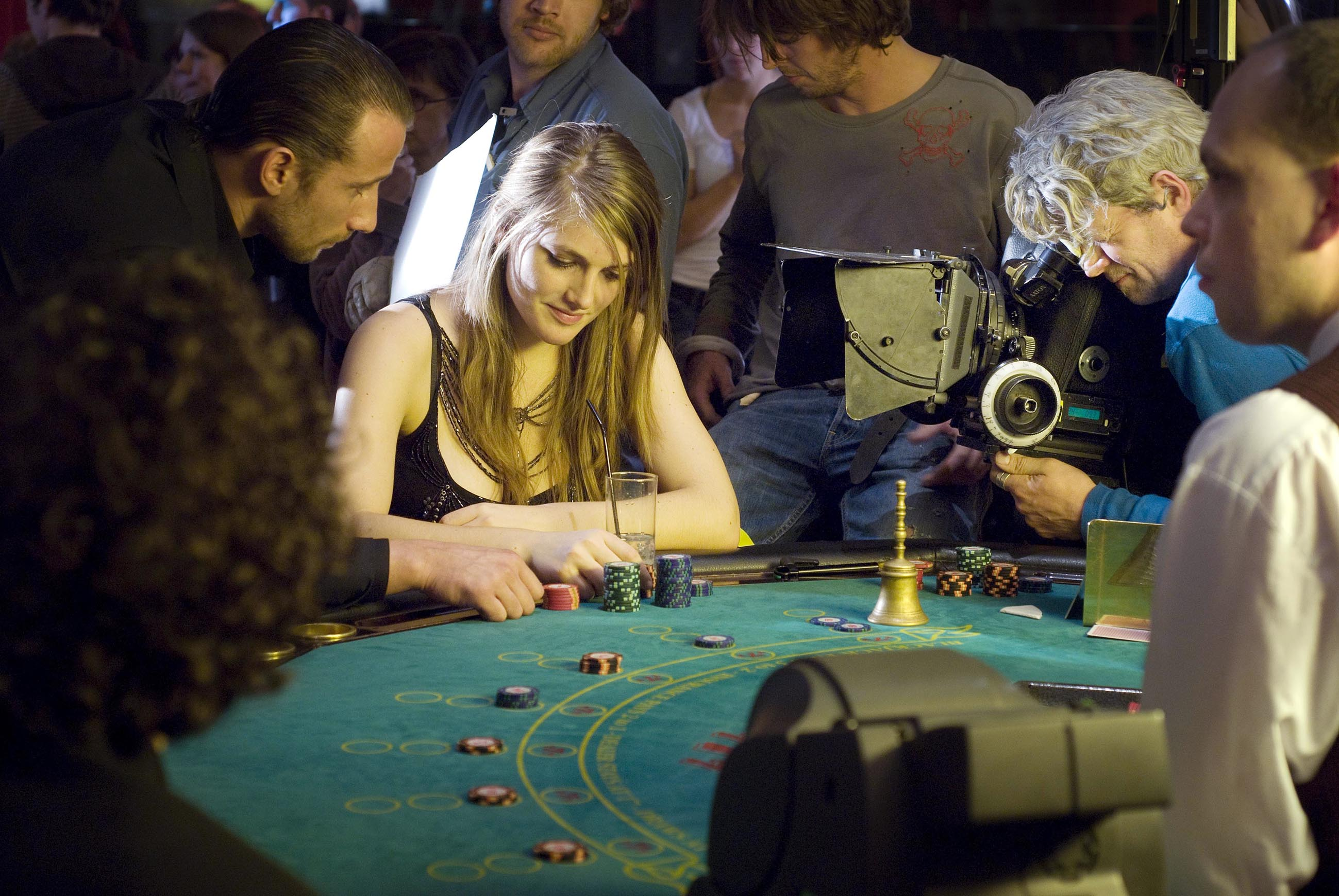 Opnames van de film 'Loft' in het casino van Oostende. Met Matthias Schoenaerts (l) en Charlotte Vandermeersch.